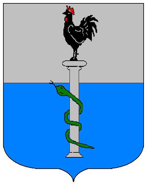 Grb obitelji Cerinić